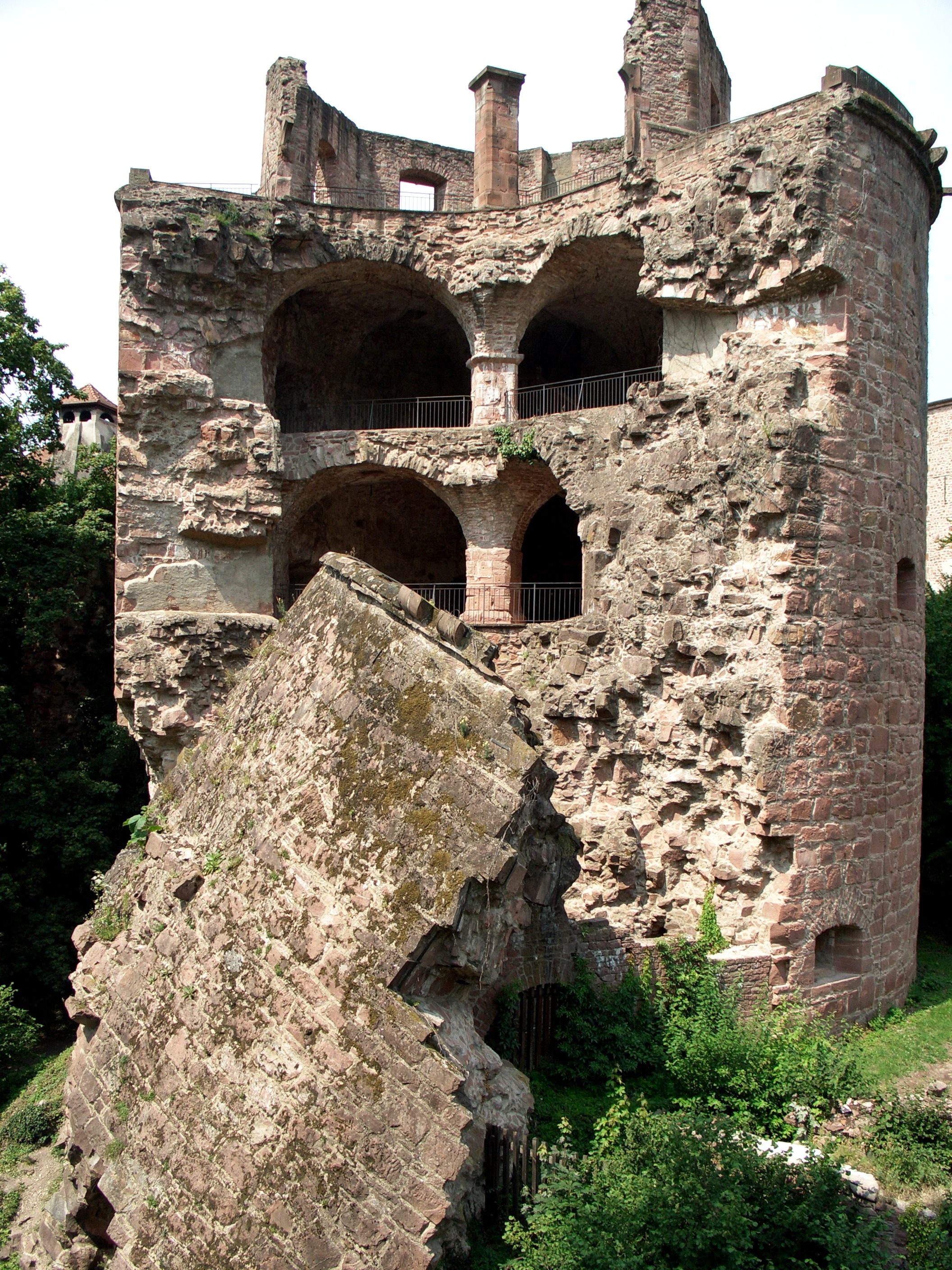 Castell d'Heidelberg - Torre destruïda